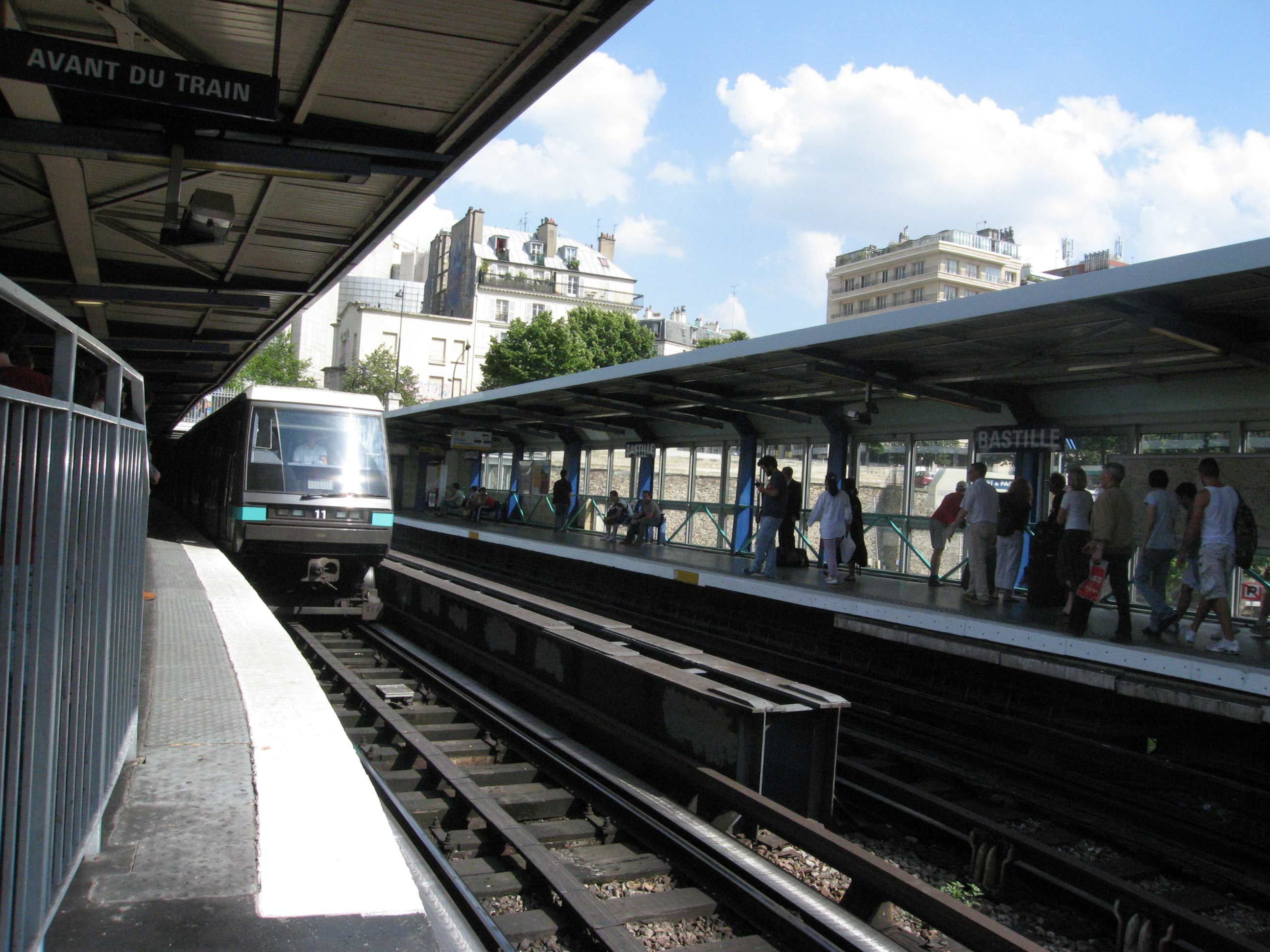 Metro de Paris Rame de la serie MP89 a la station Bastille sur la ligne 1 Lieu : Paris, France Date : Juin 2006 Auteur : Pline photo personnelle